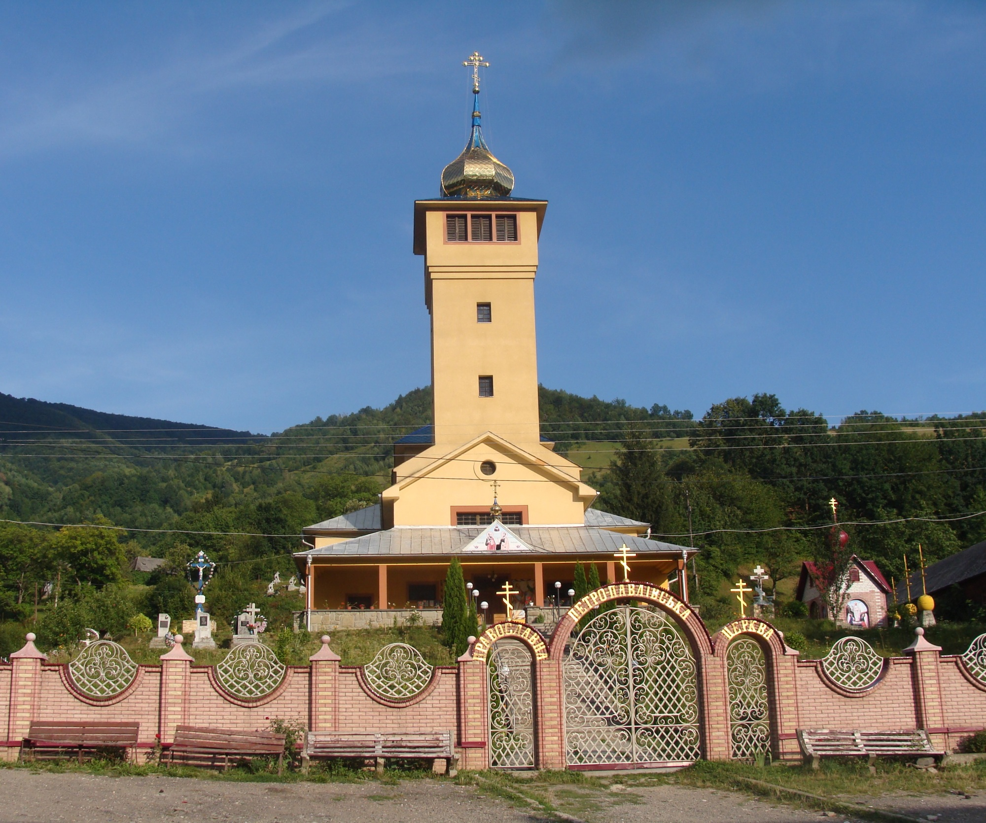 Eastern Orthodox Church in Kosivska Polyana